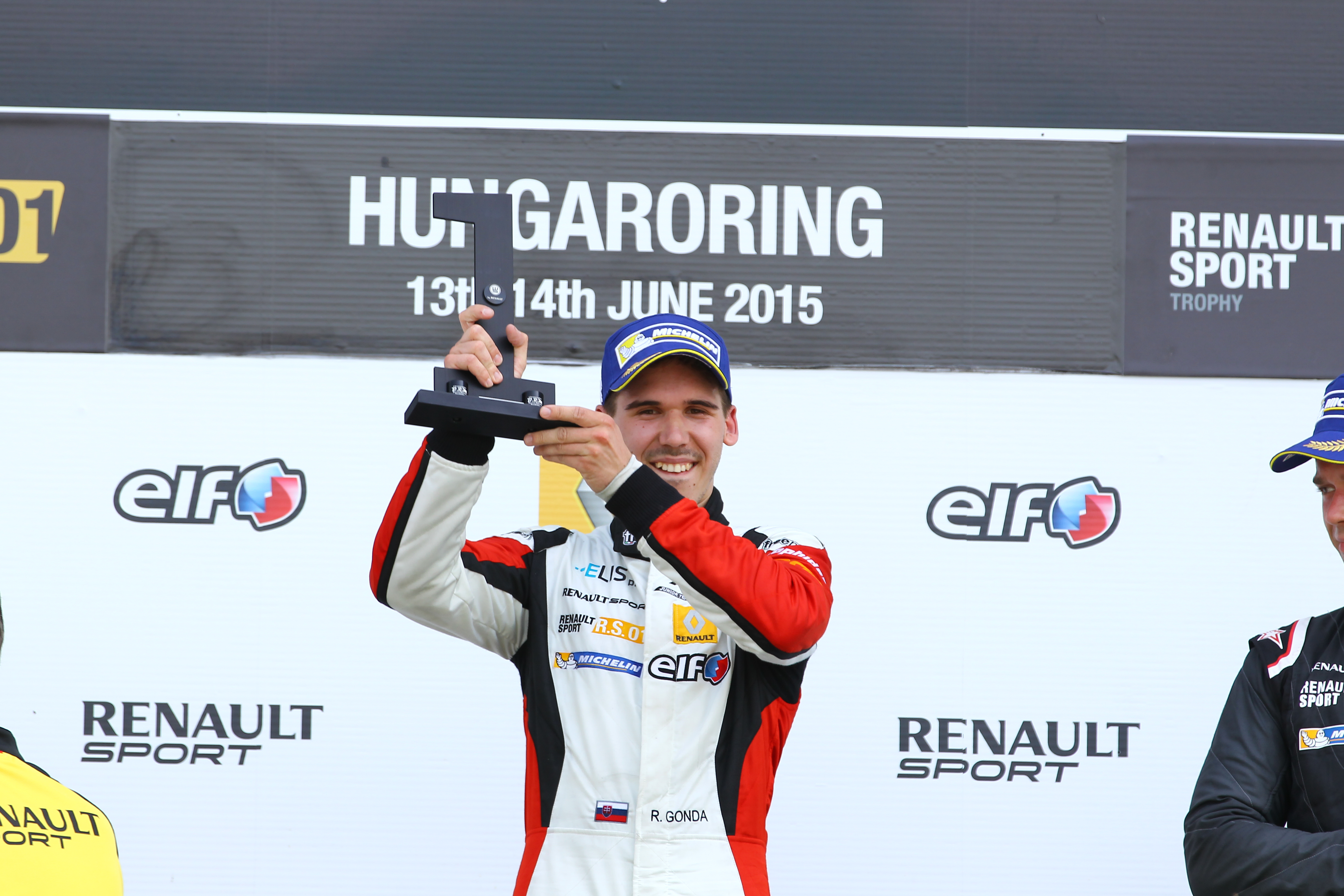 Podium Richard Gonda Budapest Renault RS01 2015